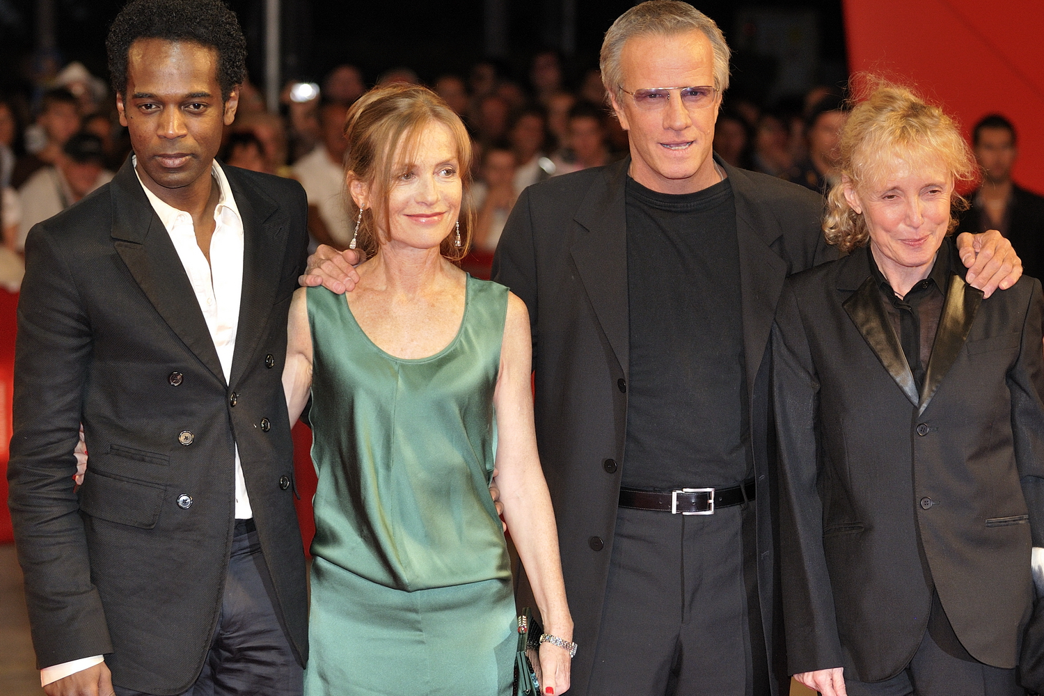 66ème Festival du Cinéma de Venise (Mostra), 5ème jour (06/09/2009) Tapis Rouge avec Christophe Lambert, Isabelle Huppert et Patrice Chéreau pour le film en compétition : White Material